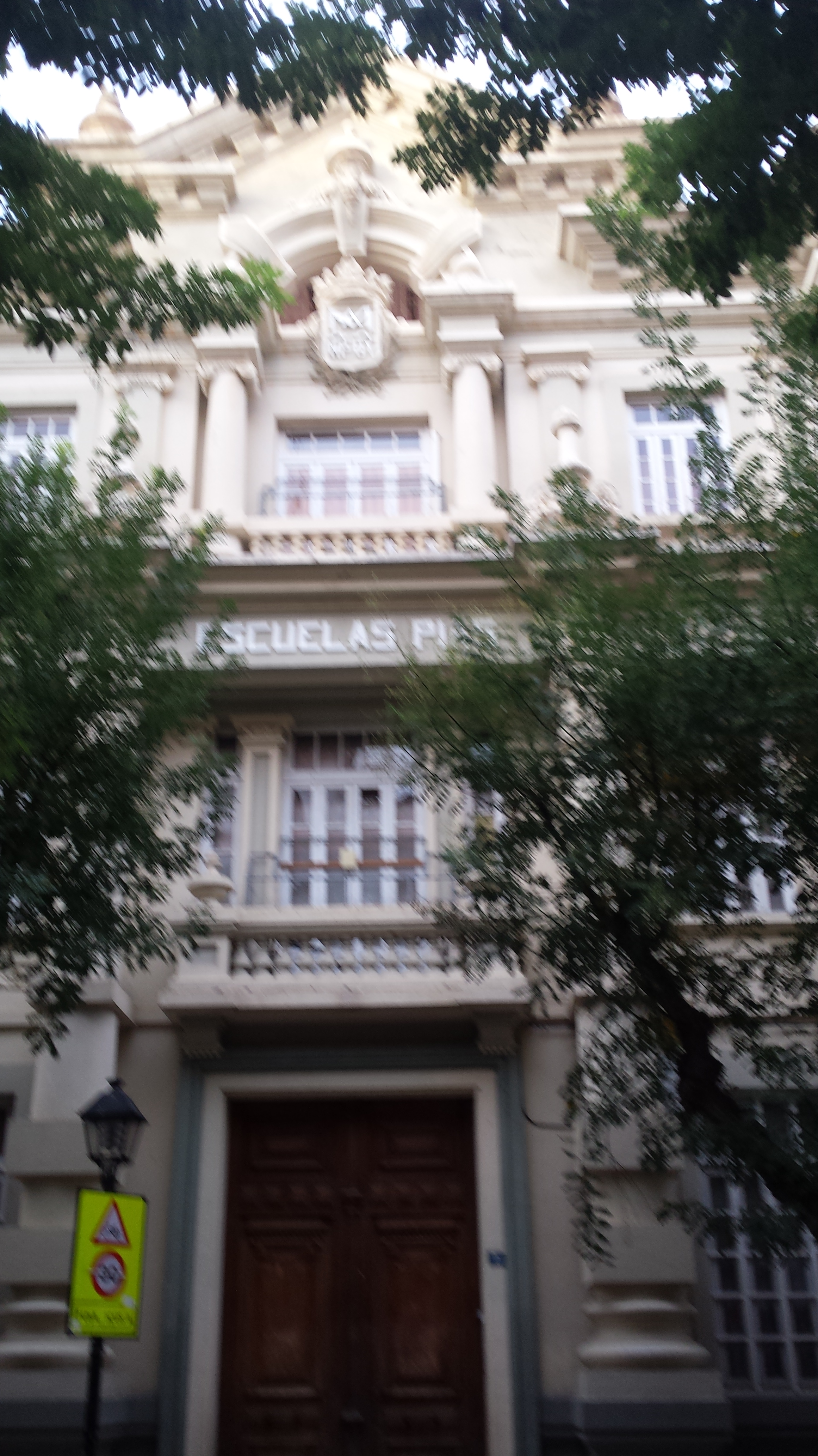 Escolapios.